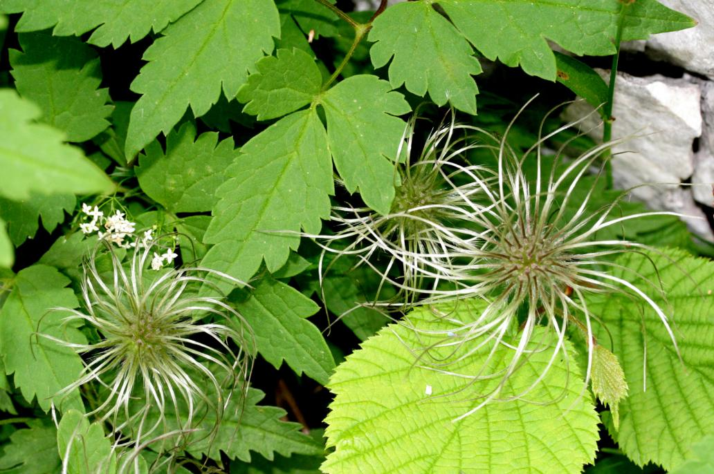 Clematis alpina (Frutti) – Località: "Giardino Botanico delle Alpi Orientali" (loc. Monte Faverghera) Belluno, quota 1500 m s.l.m.